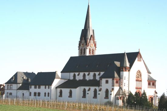 Worms-Horchheim katholische Heilig-Kreuz-Kirche (1908-10) von Nordwesten